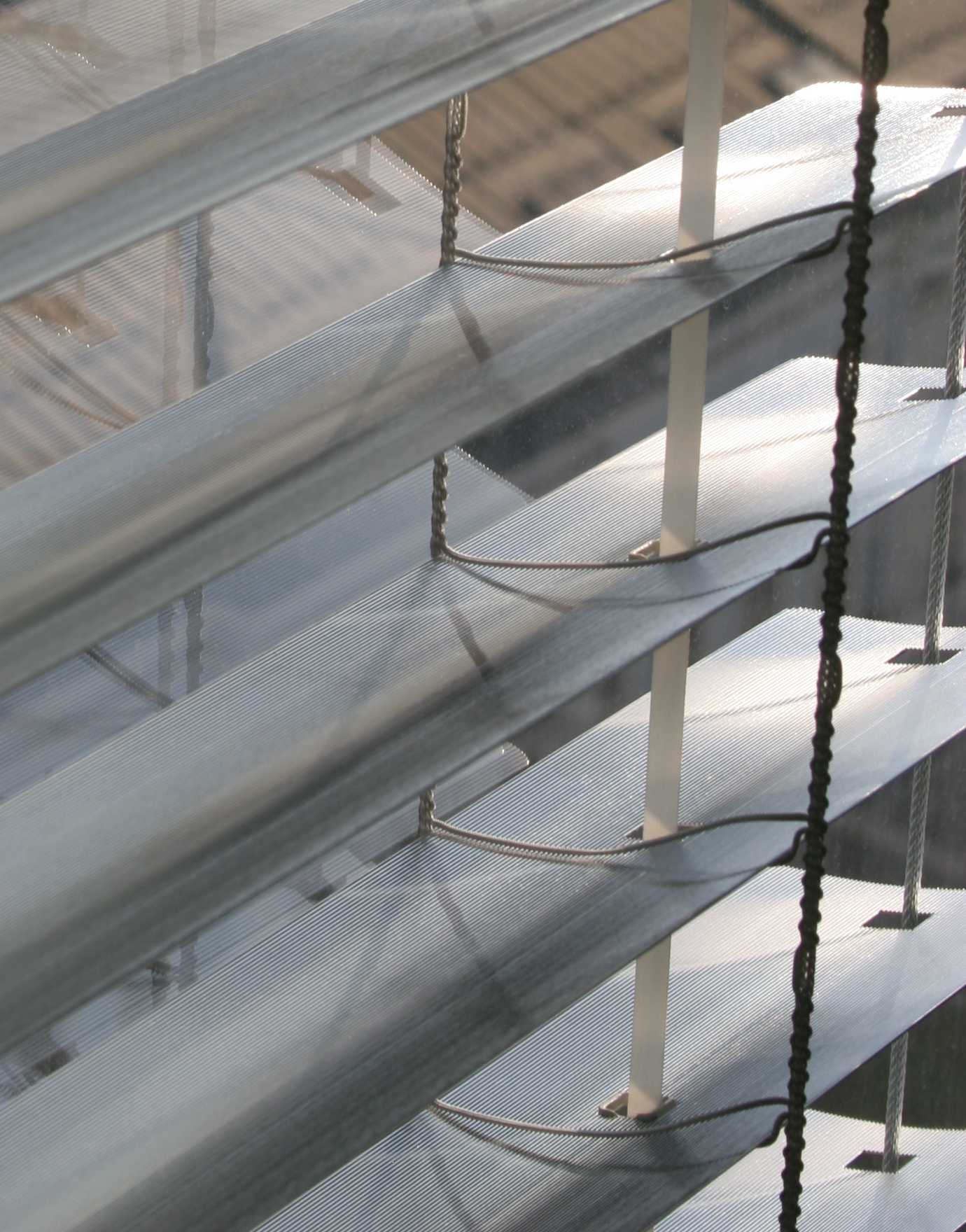 Die Sonnenschutzlamellen in der Fassade des Power Towers, Linz